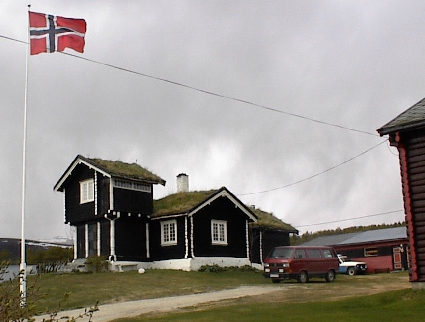 Barfrøstue i Folldal. Denne hustypen er i dag meget sjelden. Tilbygget i fronten er meget utsatt for råteskader som følge av fukt fra taket på hovedhuset. Derfor finnes det bare noen ganske få eksemplarer bevart av denne hustypen.